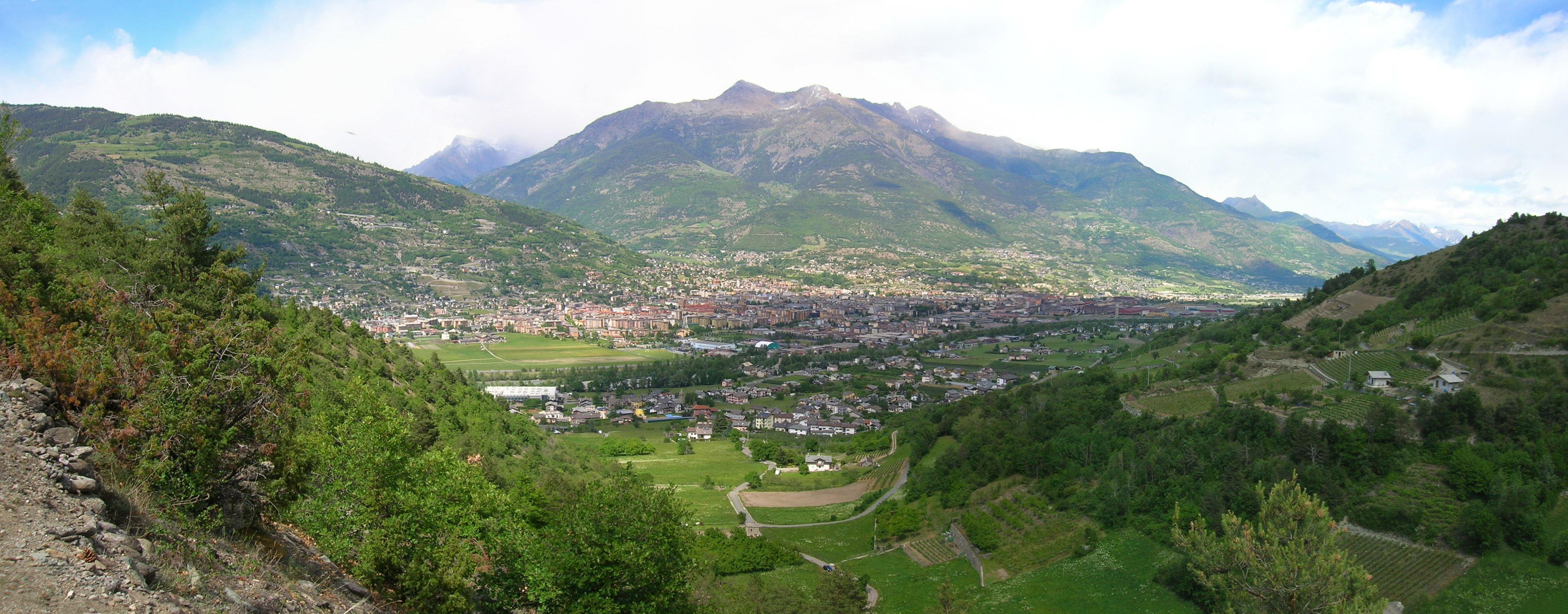 La plaine di Aosta vista dalla Riserva naturale Côte de Gargantua, Valle d'Aosta, Italia.